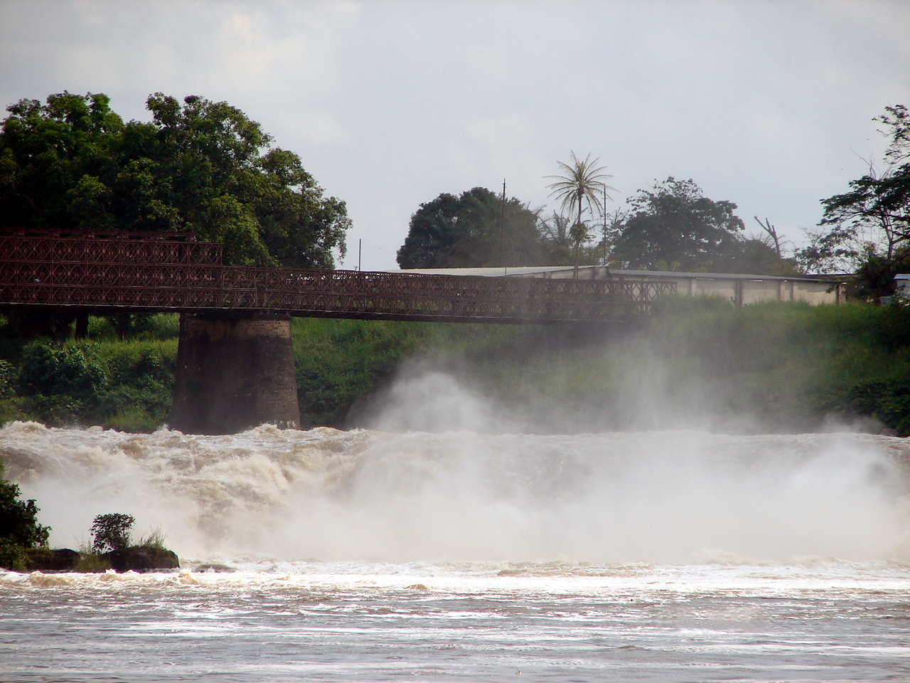 Rivière_Tshopo,_et_le_Pont_Tshopo_(Kisangani).JPG